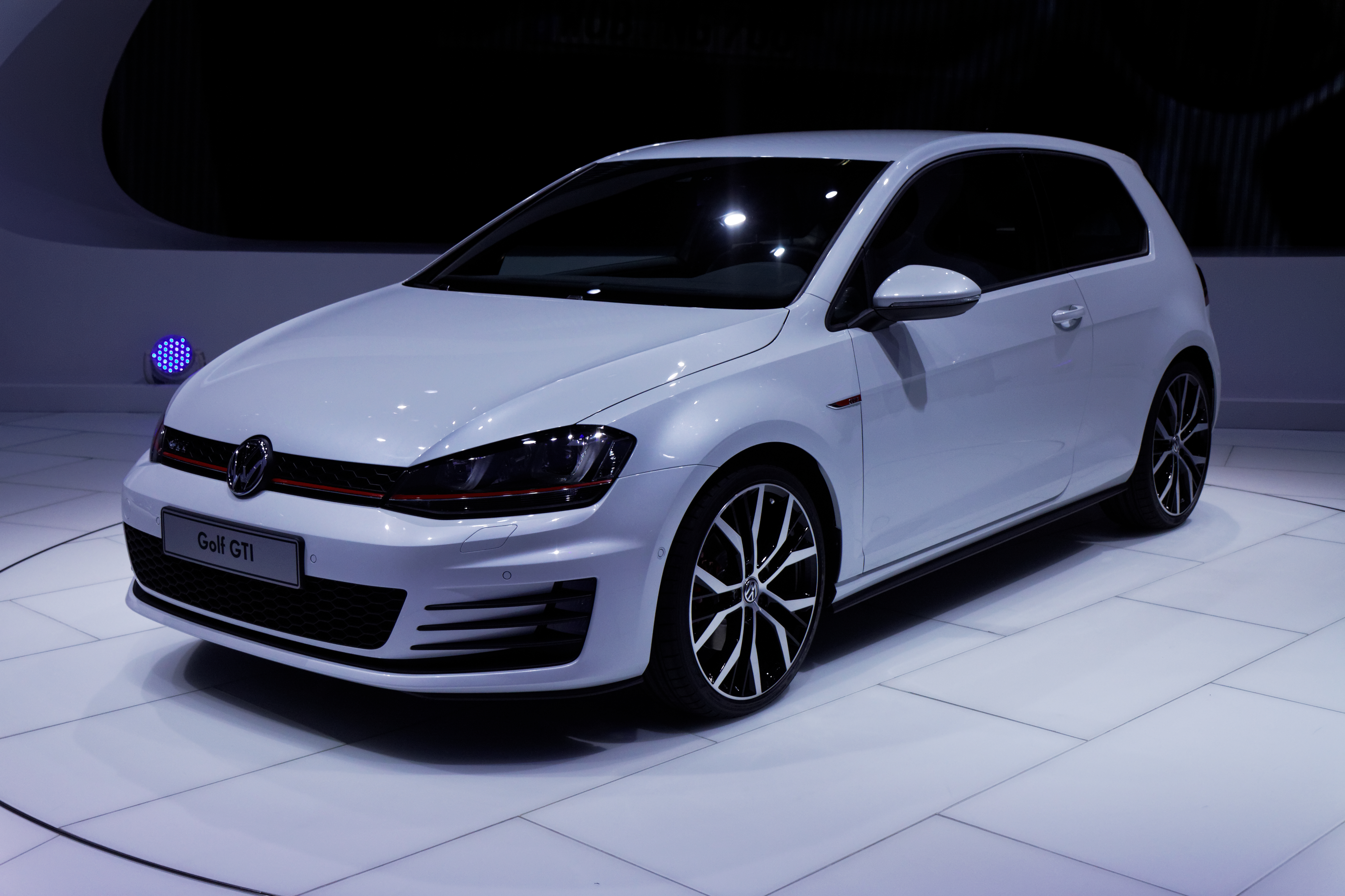 Une Volkswagen Golf GTI présentée lors du Mondial de l'automobile de Paris 2012.